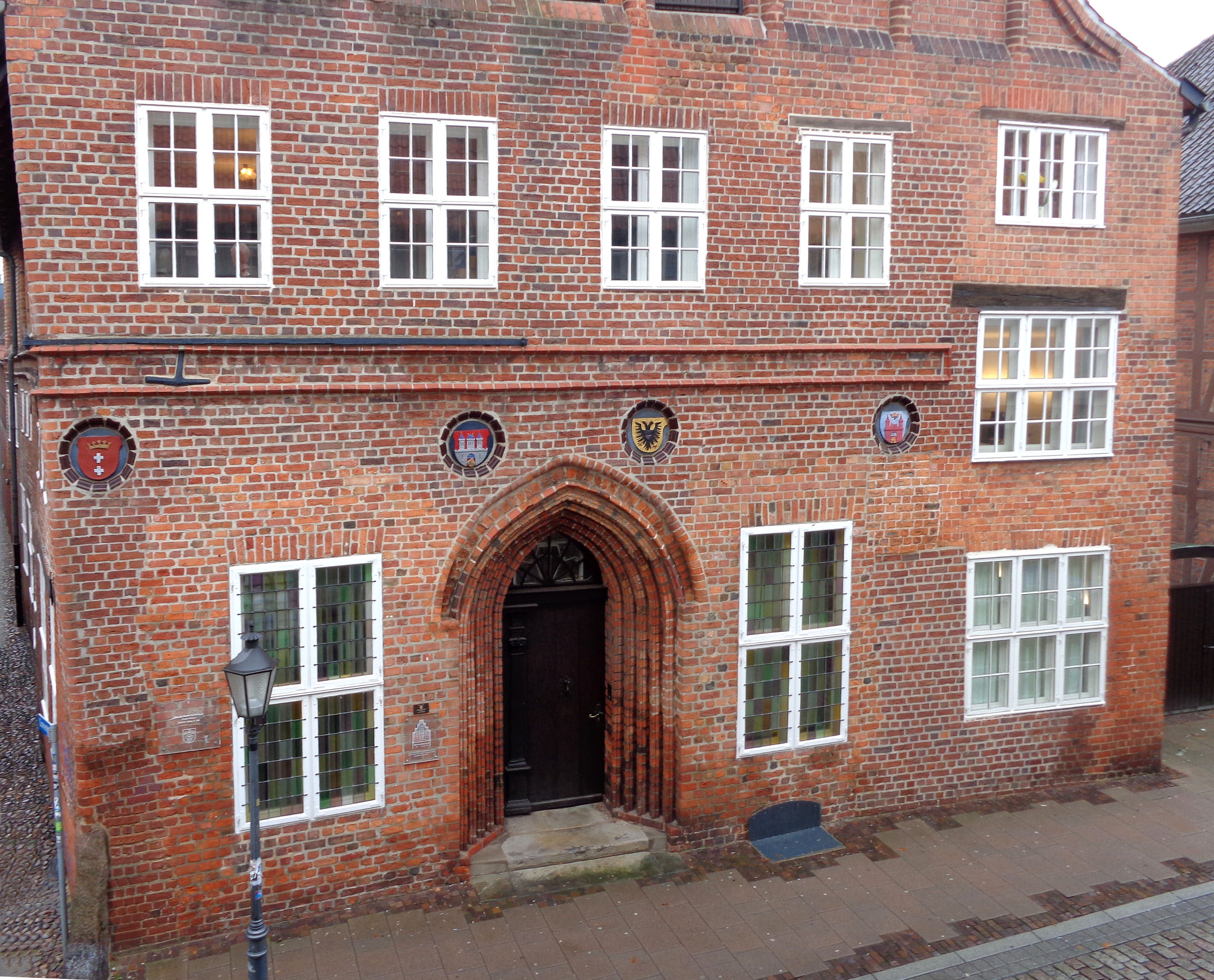 Straßenfront des Brömsehauses in Lüneburg, fotografiert aus dem gegenüber liegenden Parkhaus. This is a retouched picture, which means that it has been digitally altered from its original version. Modifications: Verkehrschild und Graffiti an Hausecke links rausretuschiert. Modifications made by AxelHH.